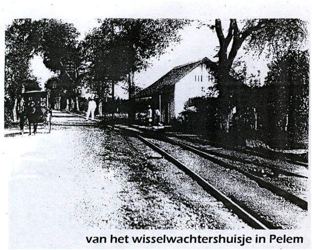 Kondisi Halte Pelem ketika masih aktif. Arah foto menuju ke Stasiun Pare. Percabangan paling kiri menuju ke Stasiun Gurah, sementara percabangan paling kanan menuju ke Stasiun Papar. Kemungkinan sebelum tahun 1940.